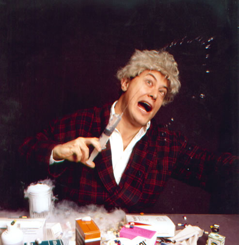 Foto di Gianni Livore, personaggio di Corrado Guzzanti